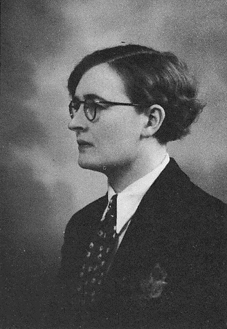 Norsk (bokmål): Astrid Alnæs Knudsen, Mosjøen.